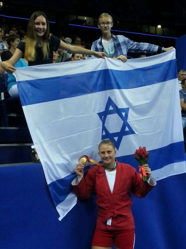 Универсиада. Казань. Самбо. Золотая медаль